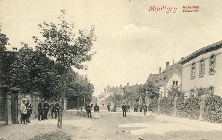 Colin Kaserne in Metz (Caserne Colin)